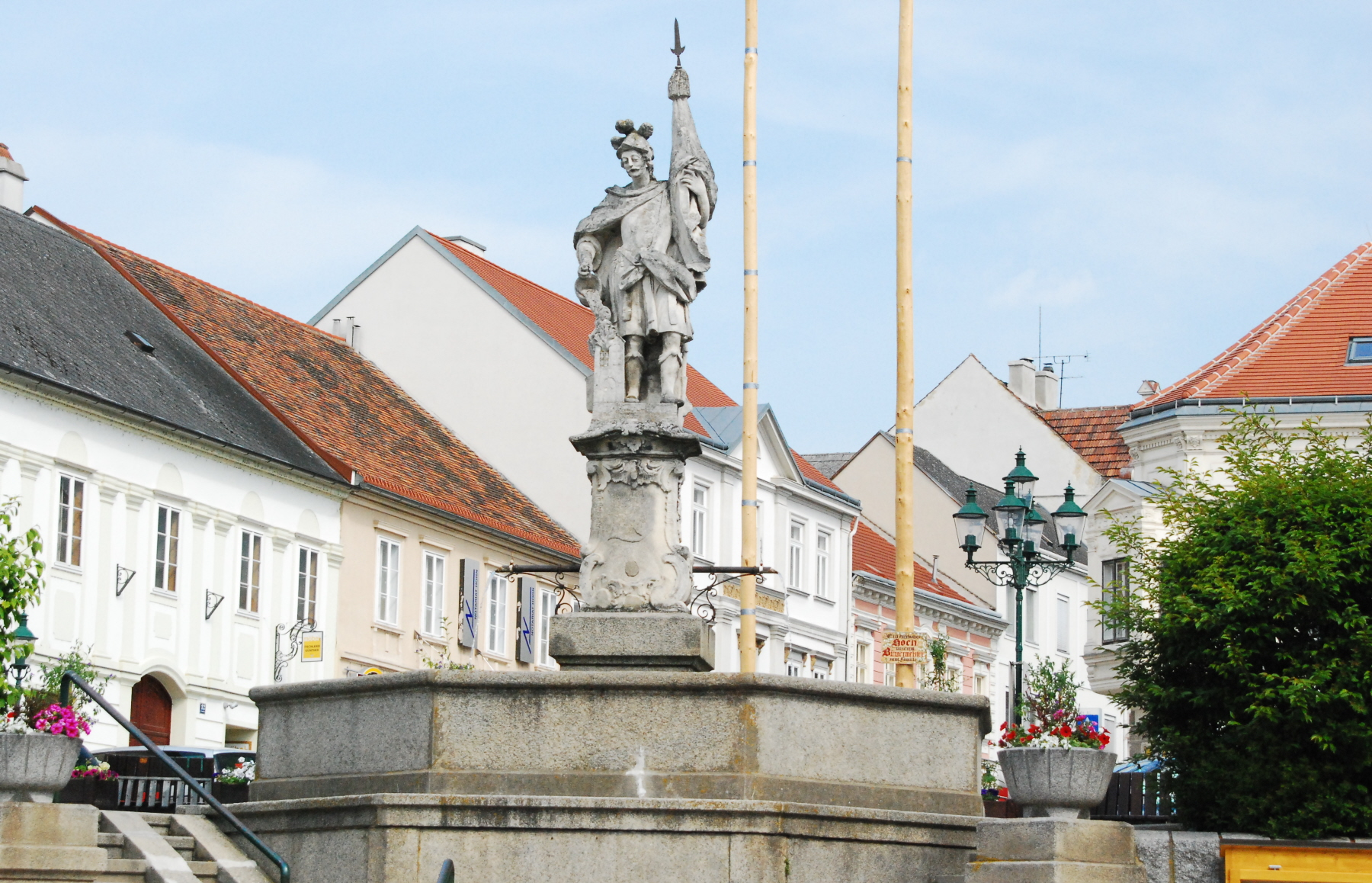 Florianibrunnen auf dem Hauptplatz von Horn in Niederösterreich